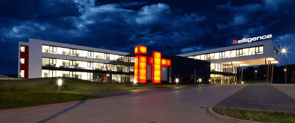 Die neue Unternehmenszentrale in Bielefeld der itelligence AG